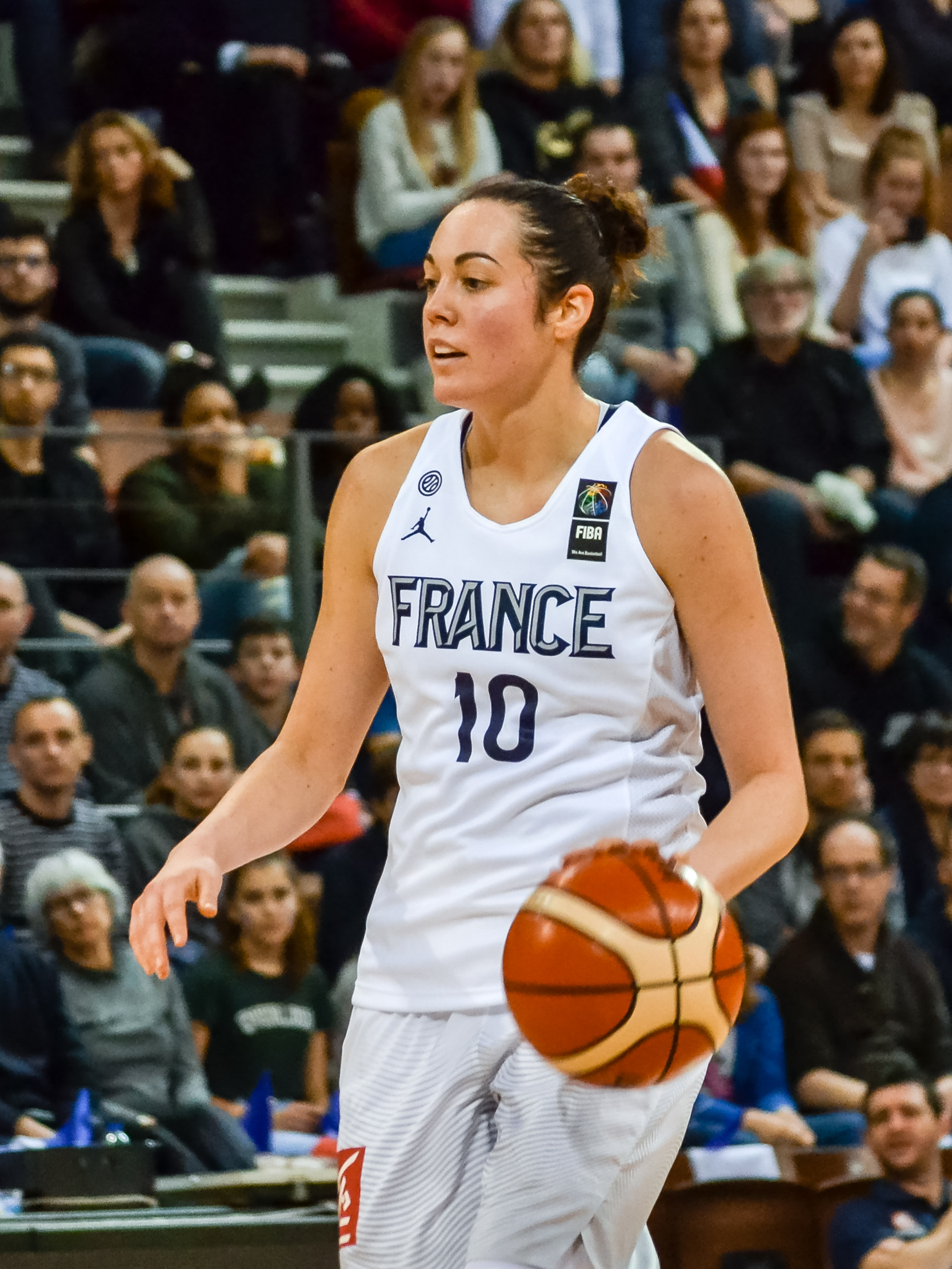 Rencontre de l'Equipe de France féminine de basket-ball contre la Finlande (90-40), comptant pour les qualifications à l'Euro 2019, le 14 février 2018 à Brest. C'était la première fois que la Brest Arena, d'une capacité de 5 000 spectateurs, accueillait un match international de basket.